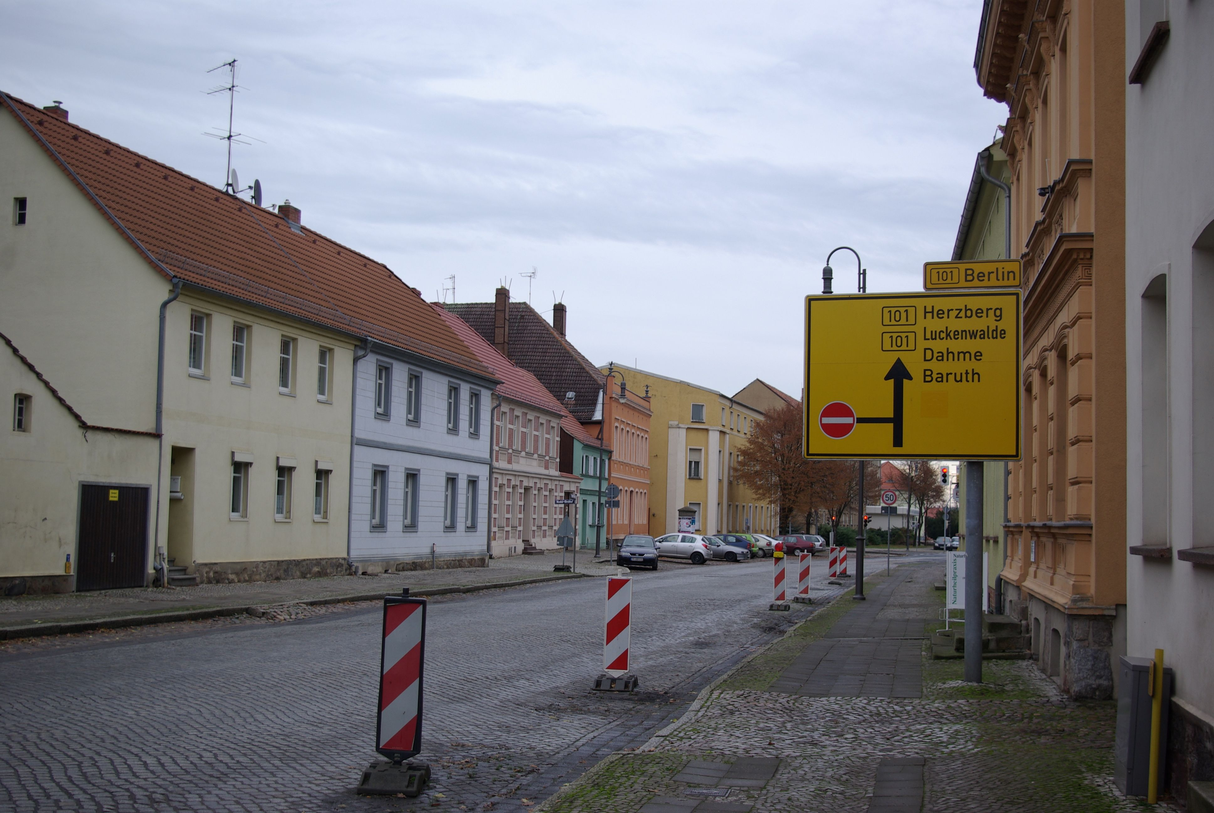 Jüterbog in Brandenburg. Die Große Straße in Jüterbog ist gleichzeitig die Bundesstraße 101.